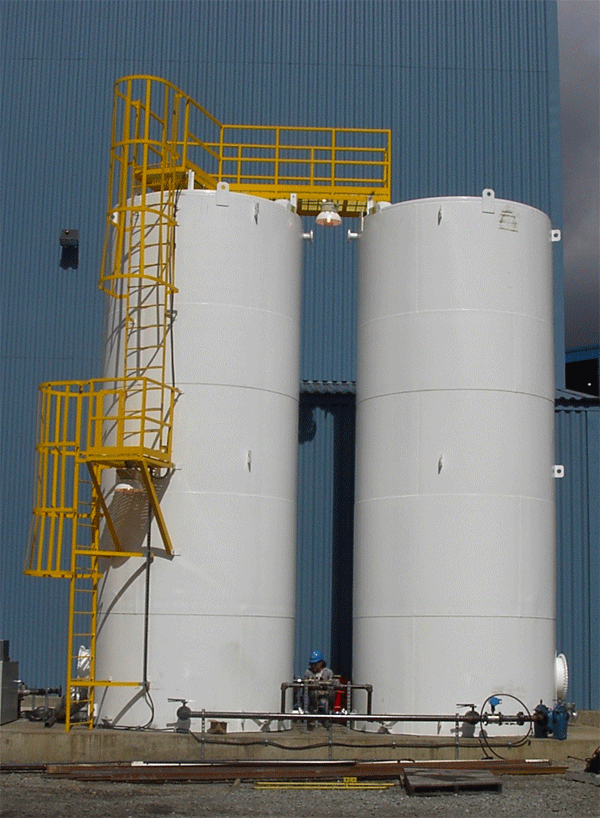 escadas de um tanque vertical